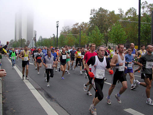 Beschreibung: Der erste Kilometer des Frankfurt Marathons 2004 Quelle: selbst fotografiert Fotograf: Thomas Schmidtkonz Datum: 31.10.2004 Weblinks Weitere Bilder und Bericht zum Frankfurt-Marathon 2004 Kategorie:Marathon